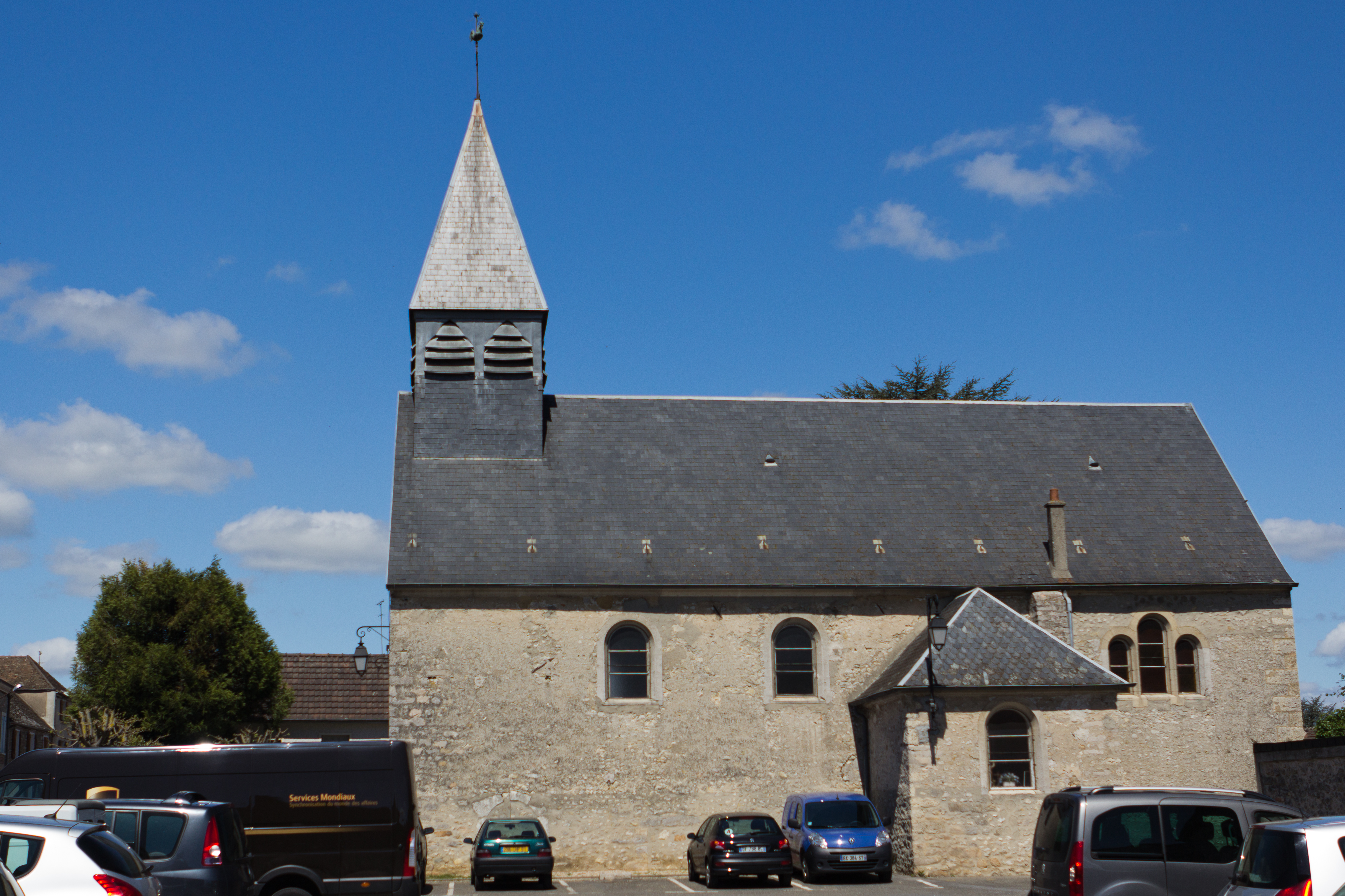 Église de Boissy-le-Cutté, Boissy-le-Cutté, département de l'Essonne, France.